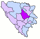 BosniaCanton ZenicaDoboj